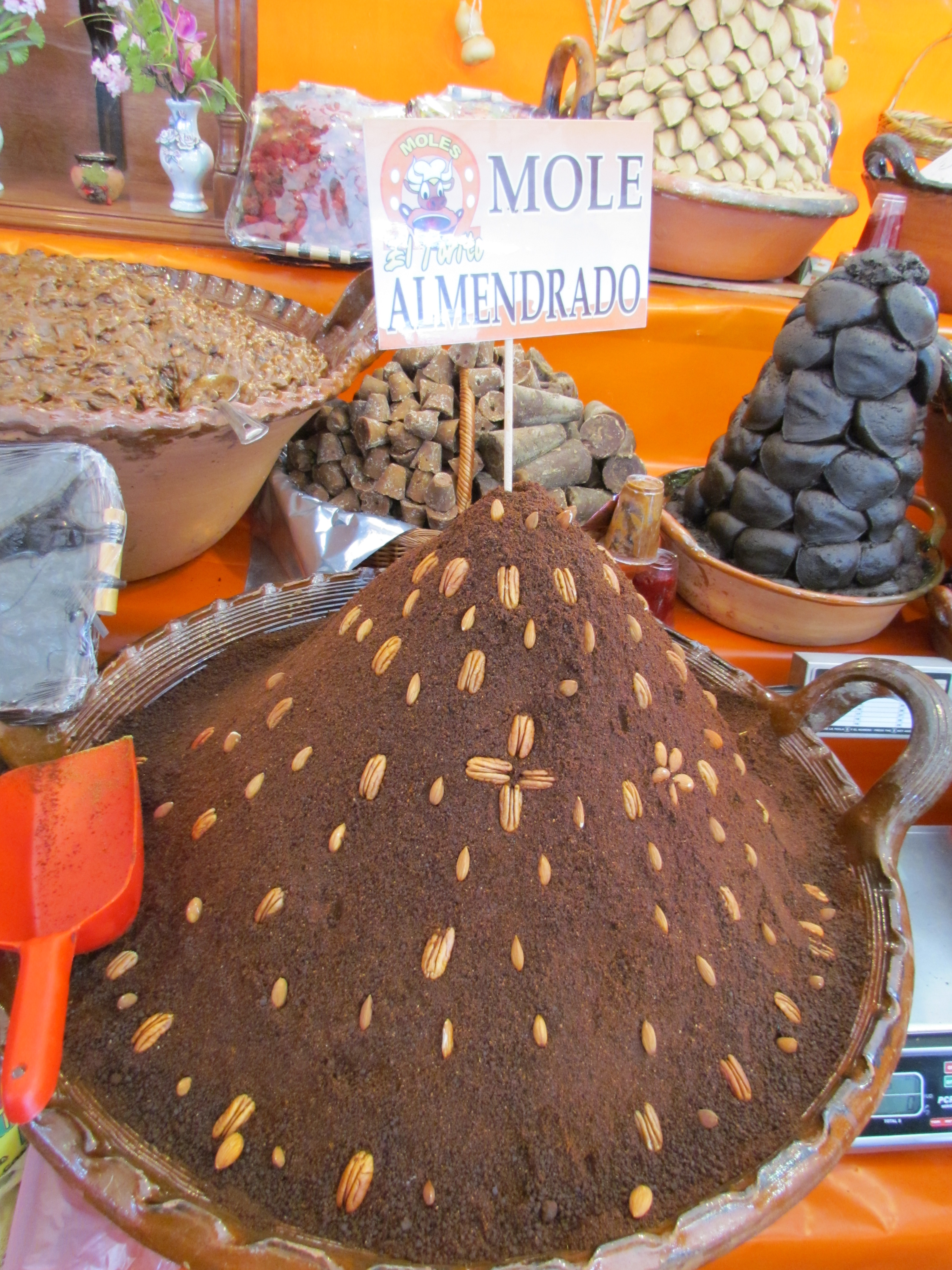 Muestra de Mole almendrado en la Feria del Mole 2014